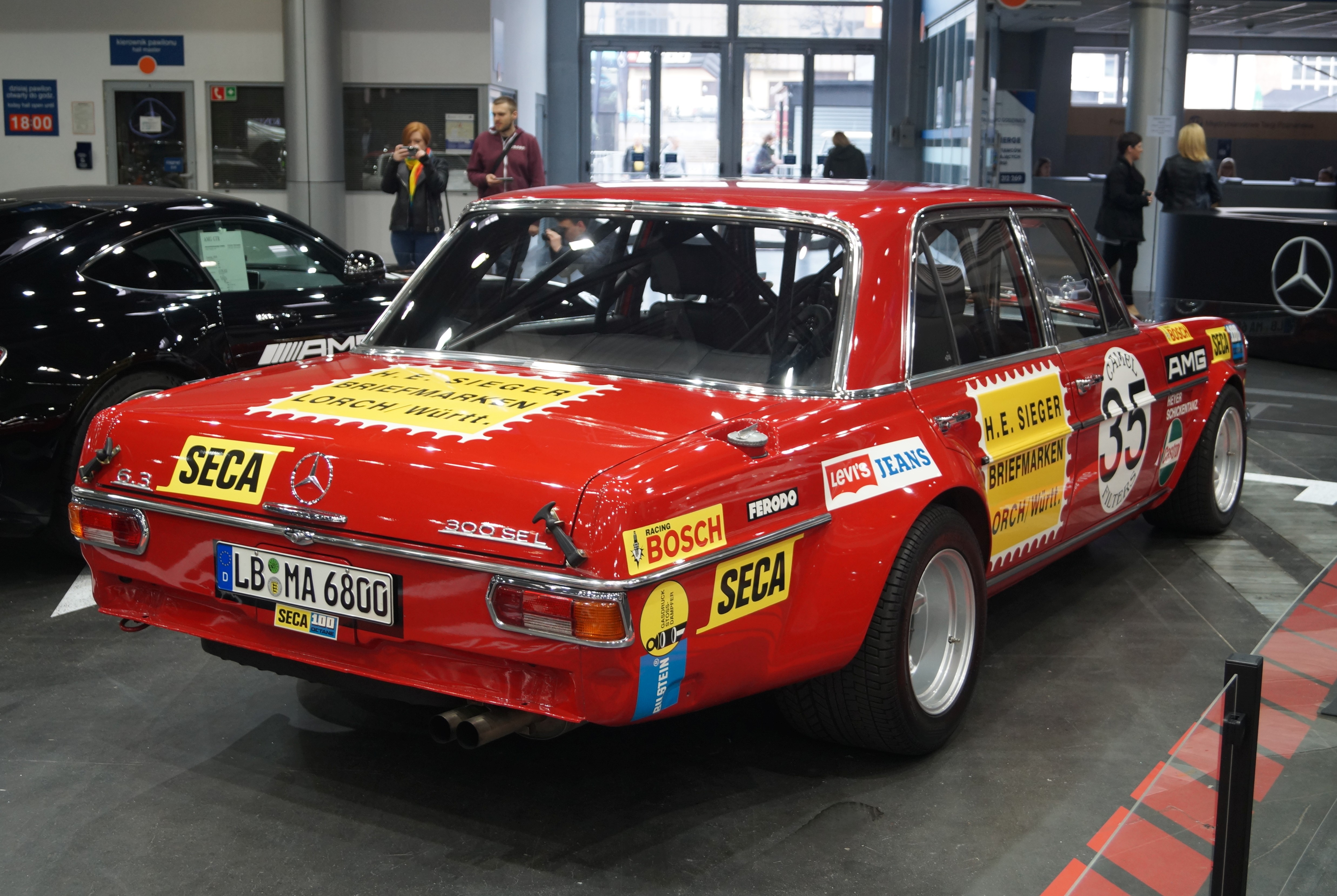 Prawy tył Mercedesa-Benz 300SEL 6,3 (W109) na Motor Show Poznań 2017.